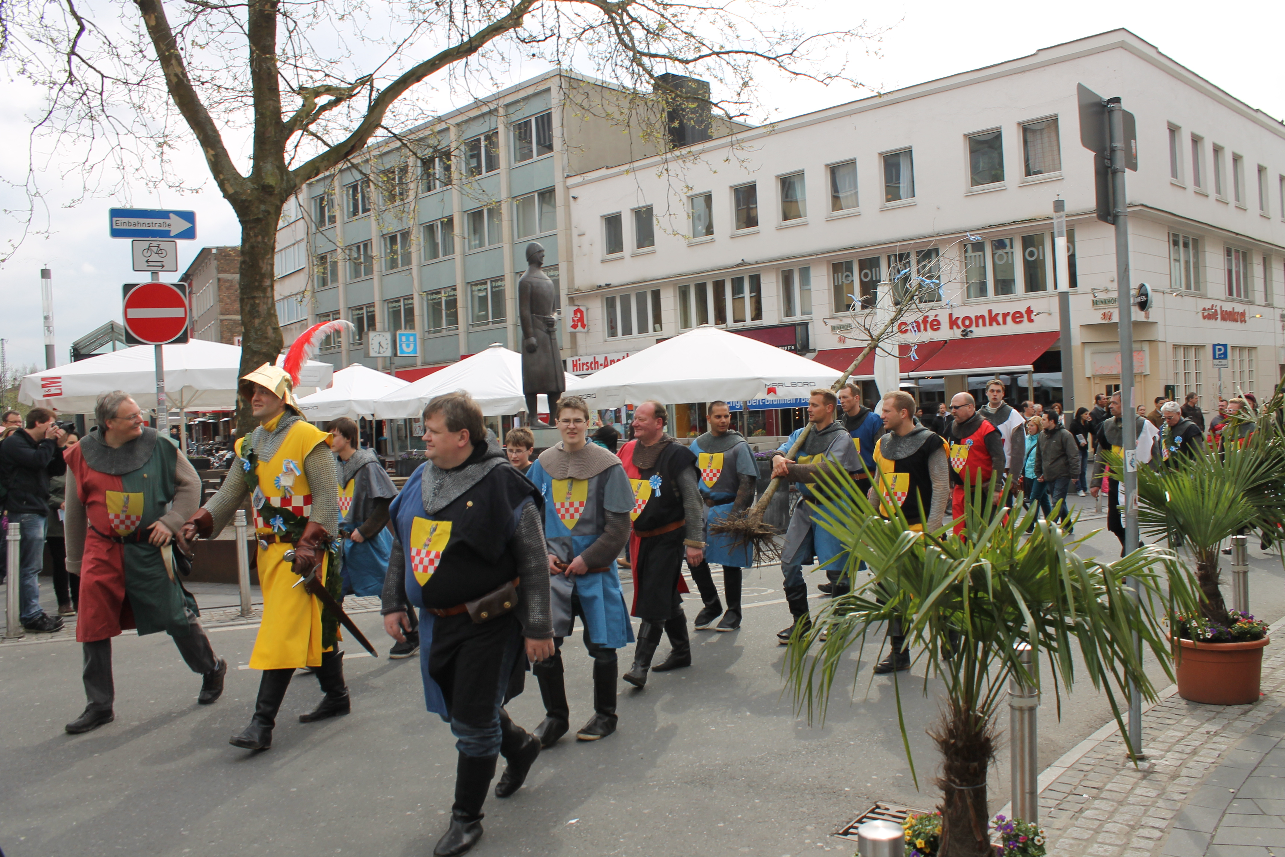 Festumzug zum traditionellen Maiabendfest in Bochum am 27. April 2013. Hier zieht die Figur des Grafen Engelbert III zusammen mit den Bochumer Junggesellen und der Eiche an dem Denkmal des Grafen Engelbert III vorbei.